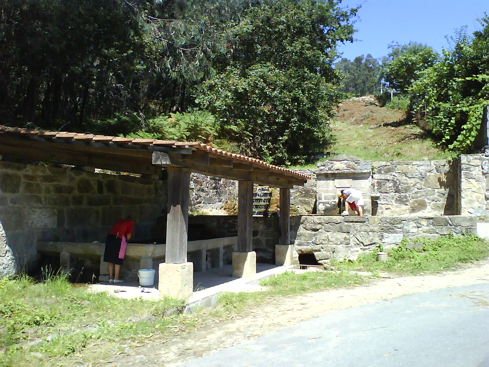 Fuente de Berdocedo en Moaña, Pontevedra, Galicia (España).